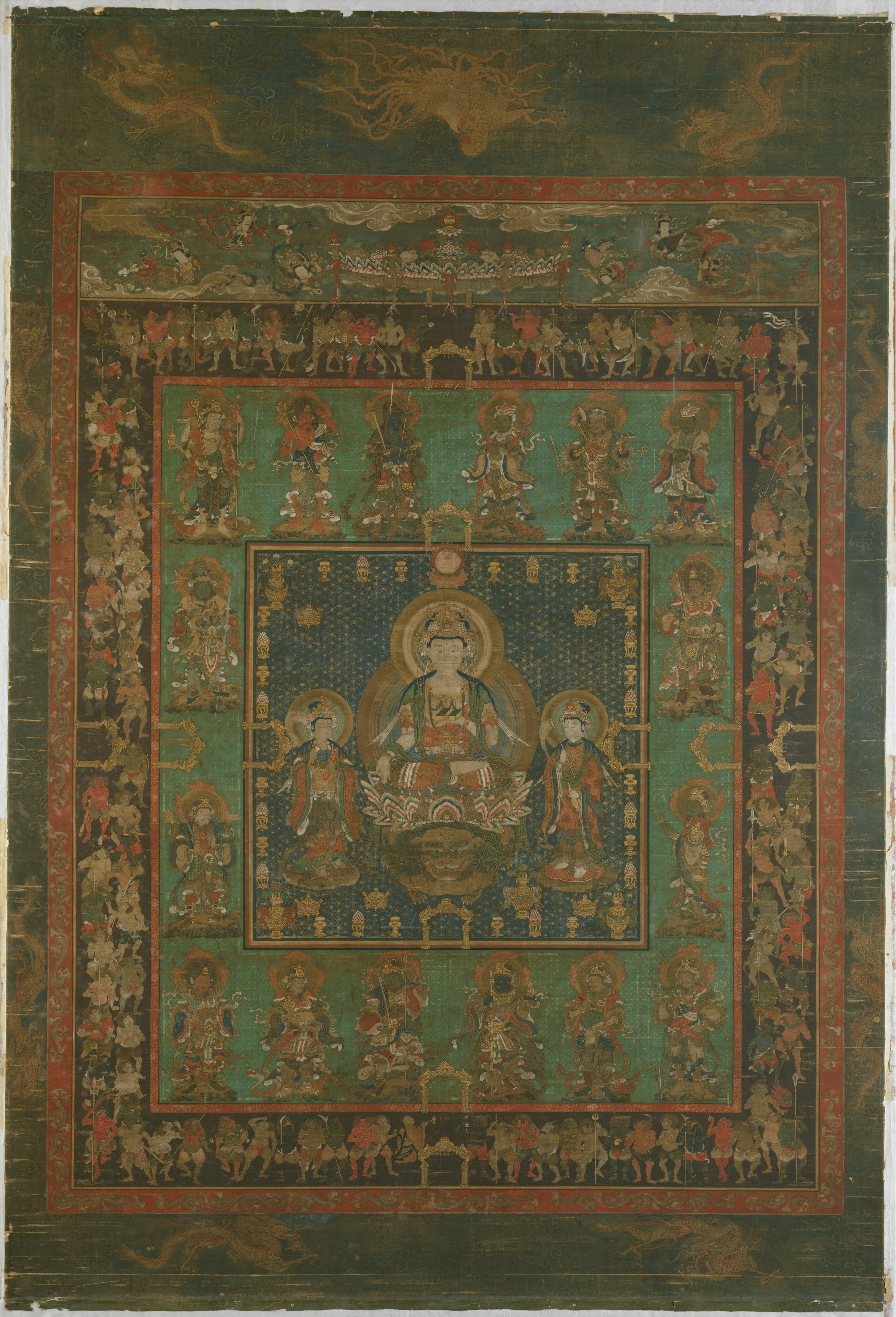 Japan; Hanging scroll; Paintings